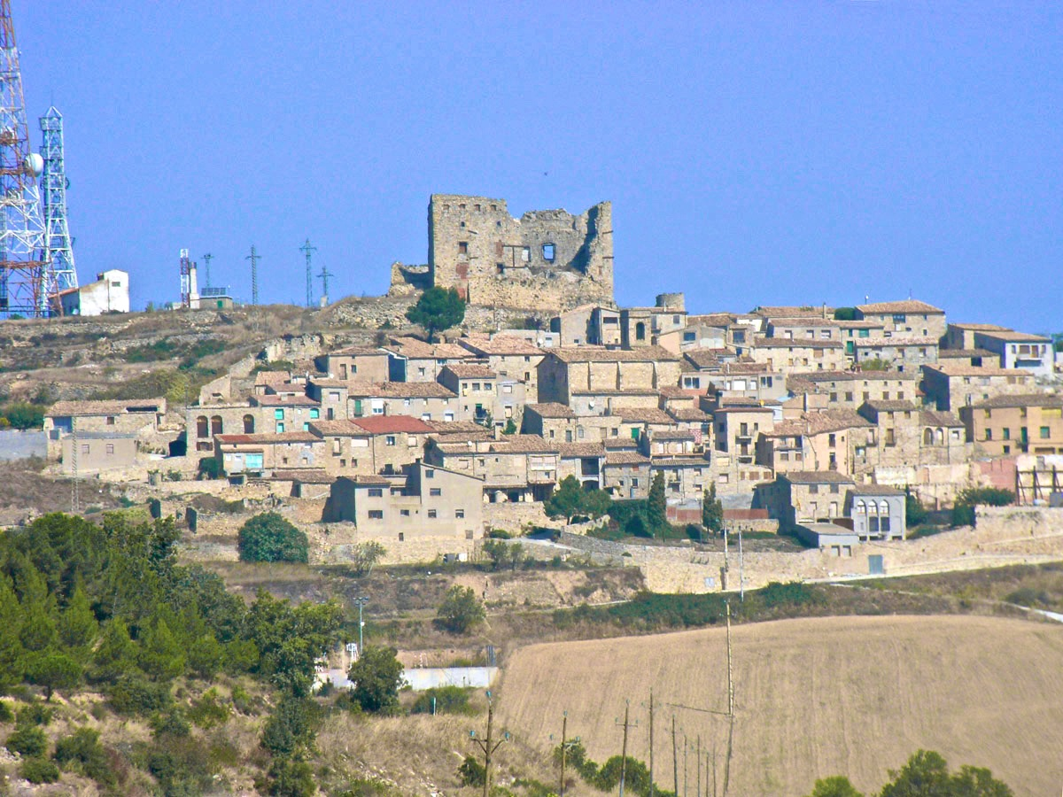 Savallà del Comptat dominat pel castell